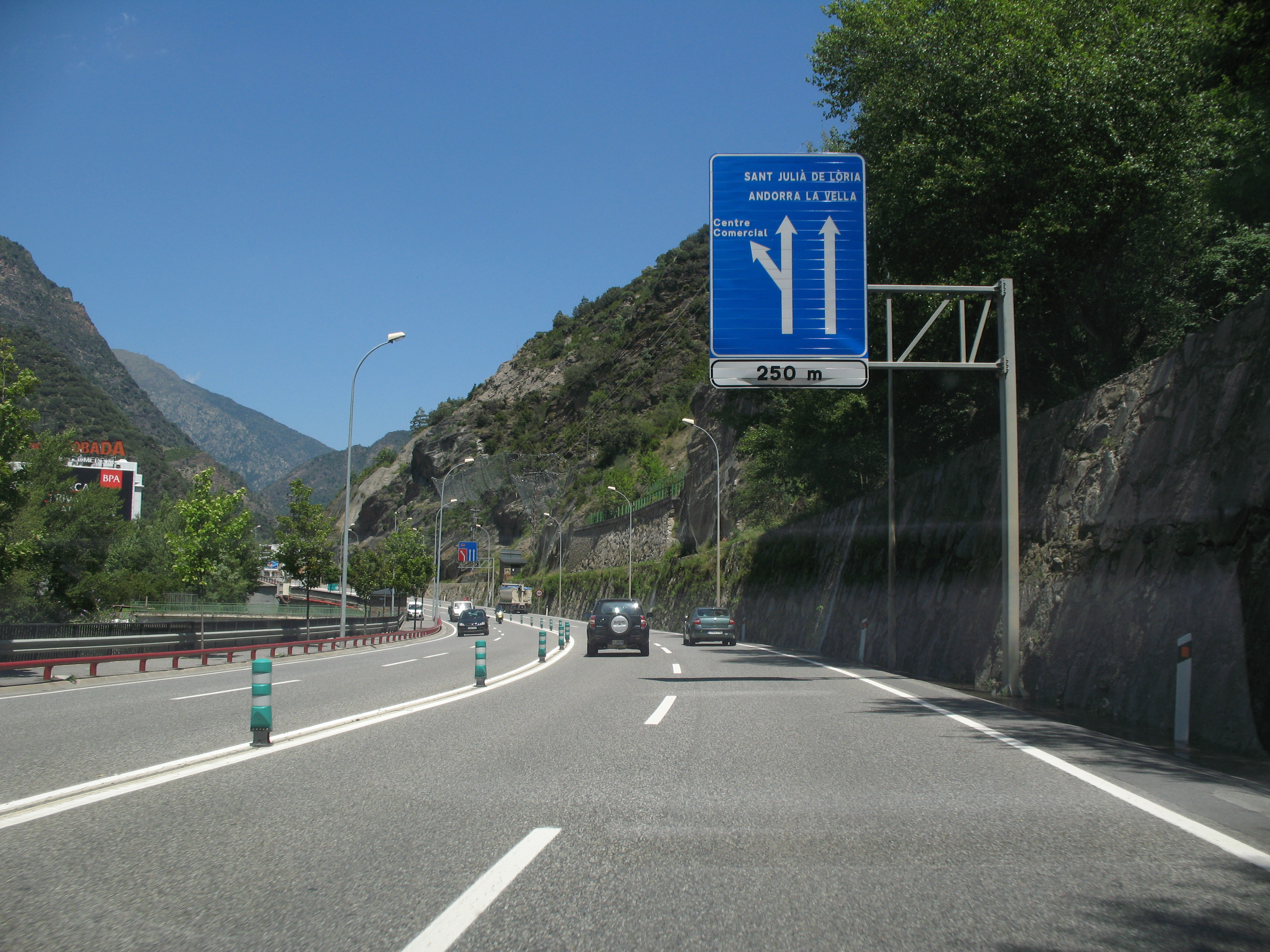 La Route CG-1 près du centre commercial de Sant Julia de Loria en Principauté d'Andorre.